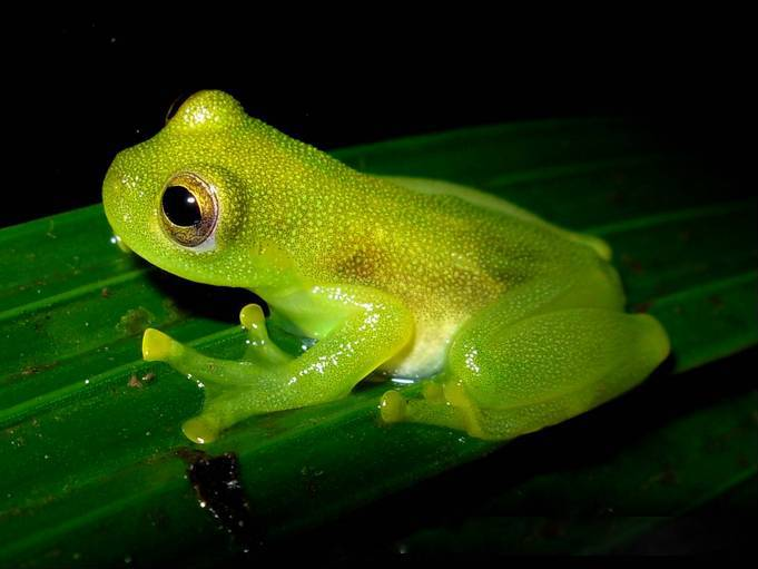 Rulyrana susatamai - Syn.: Cochranella susatamai